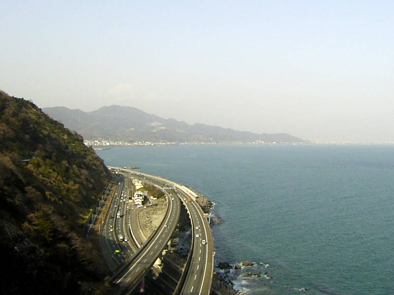 旧由比町薩埵峠より。中央の高架橋が東名高速道路、下をくぐる道路が国道1号。左側の鉄道は東海道本線。